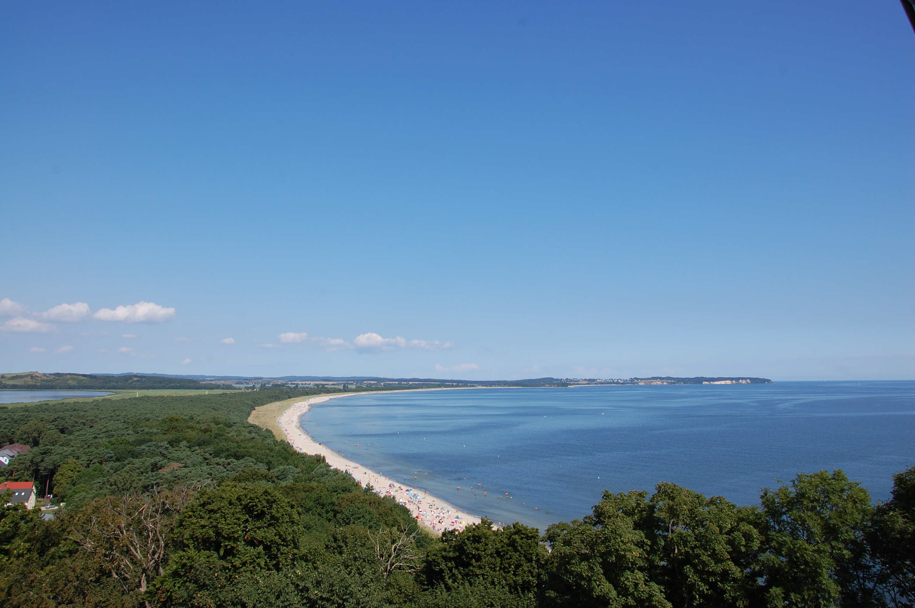 Thiessow Blick zum Nordperd - Göhren